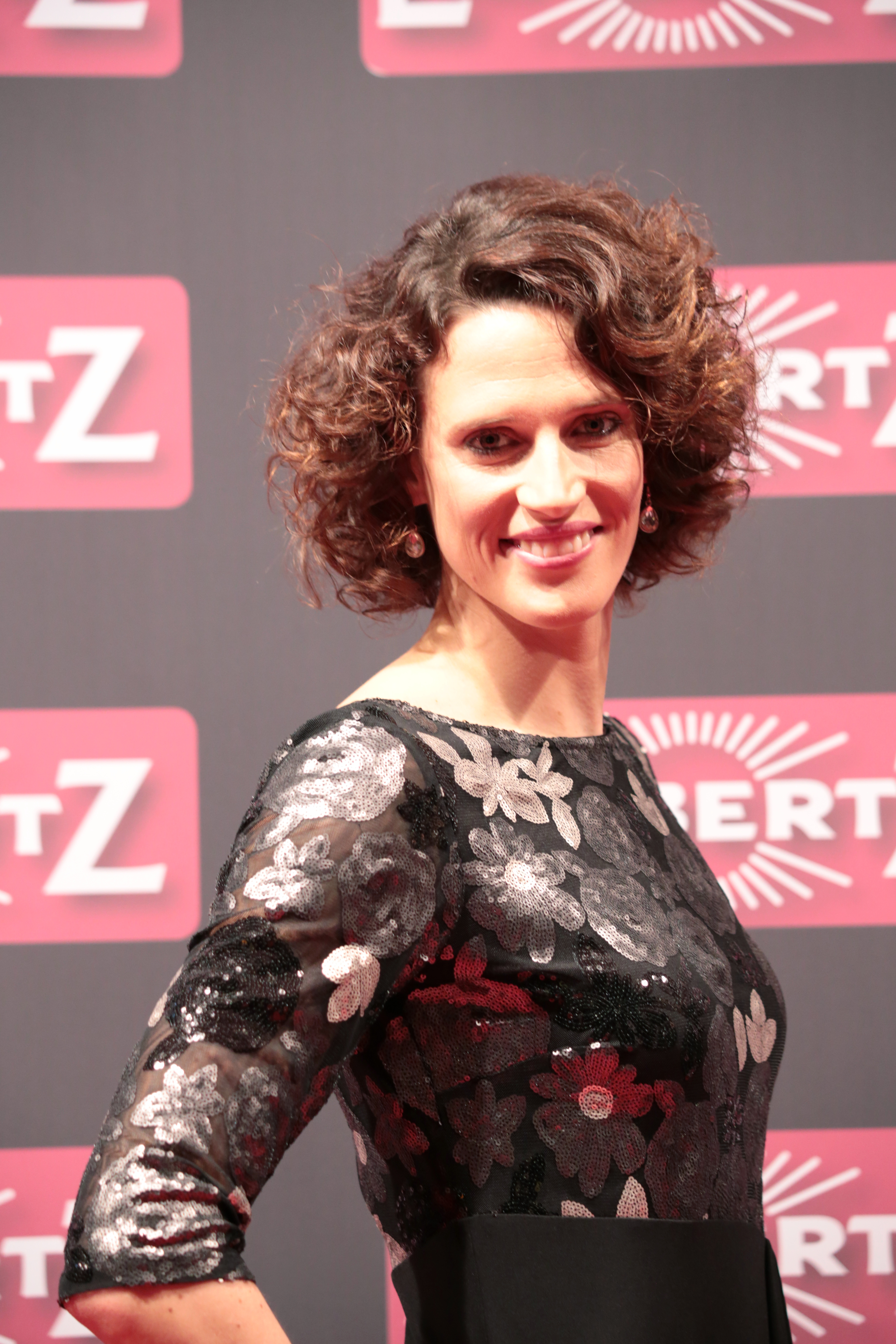 Lena Schöneborn bei der Lambertz Monday Night 2018.